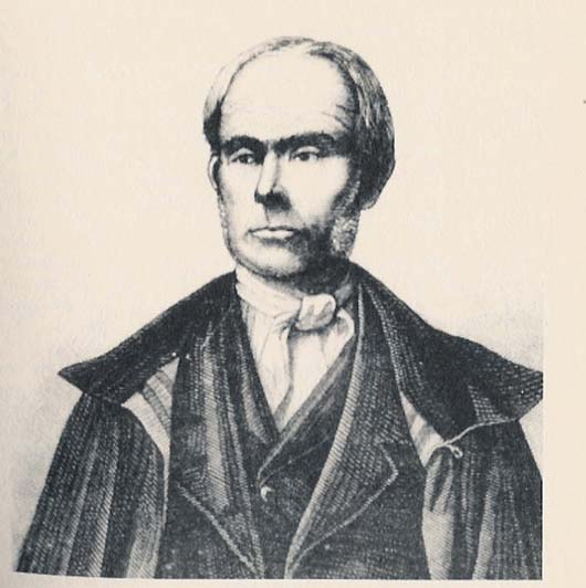 ritratto di Antonio Boggia (1799 - 1862).